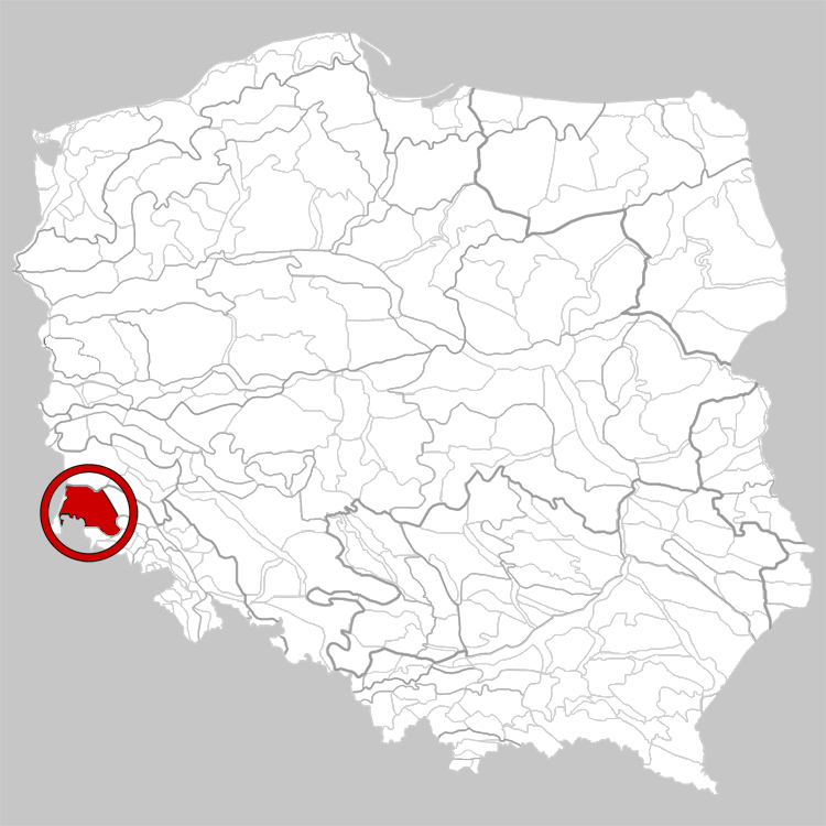 Physico-geographical regionalization of Poland Mezoregion 332.26 Jizera Upland Regionalizacja fizycznogeograficzna Polski Mezoregion 332.26 Pogórze Izerskie